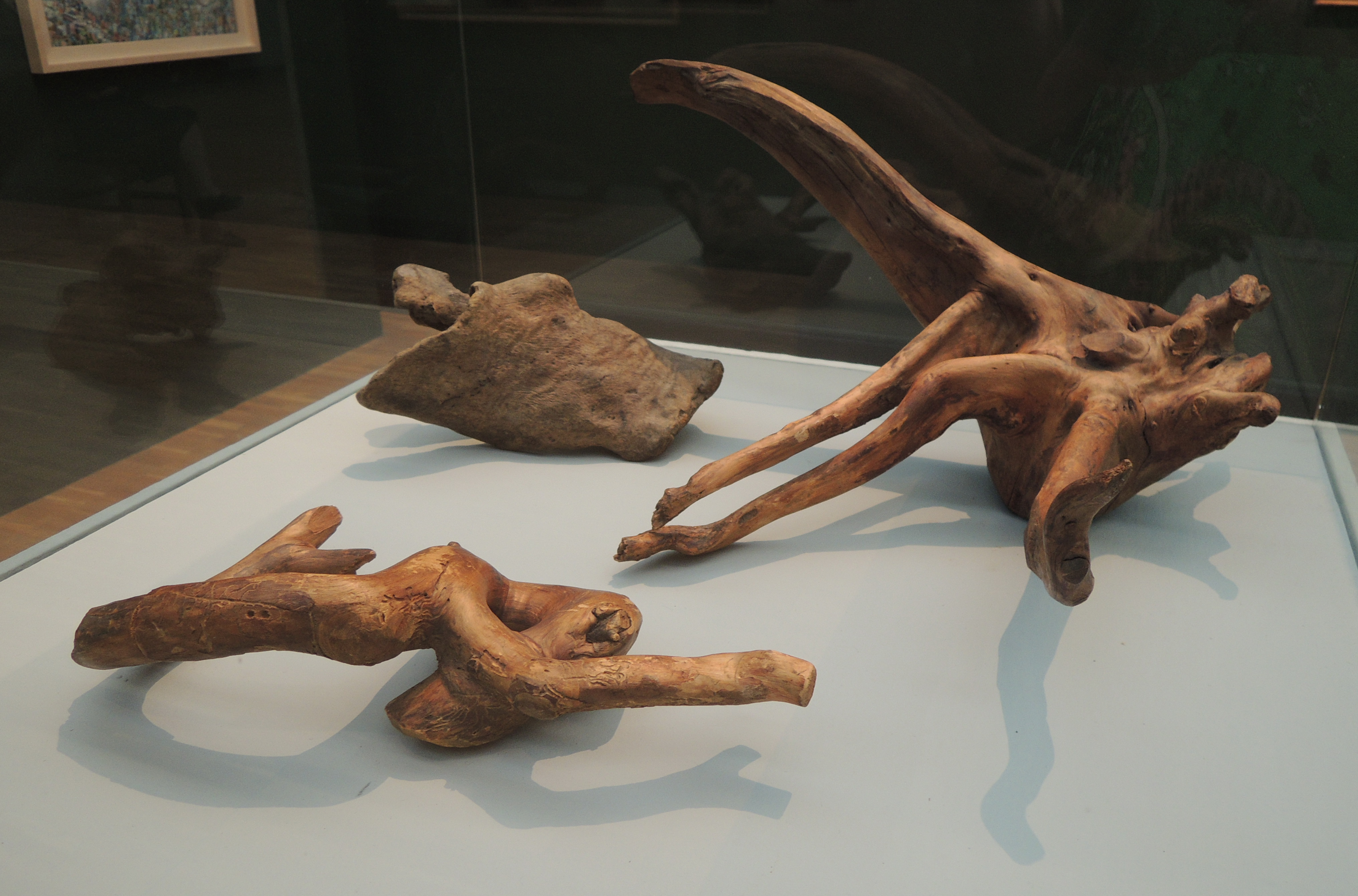 М.В. Матюшин (1861-1934). "Корневая скульптура", 1920-е. Дерев. ГТГ. Инв. СКС-3076, 3077, 3078. Дар А.В. Повелихиной